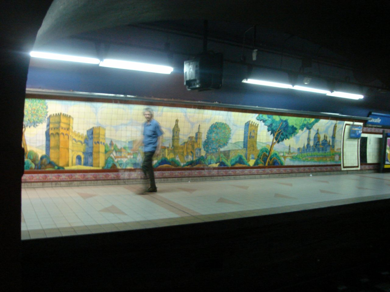 Vista del andén a Constitución de la estación Lavalle de la línea C de la red de subterráneos de la Ciudad de Buenos Aires.